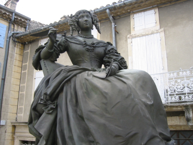 Statue de Madame de Sevigné sur une place du village de Grignan en Drôme Provençale. sculpteur : Louis Rochet